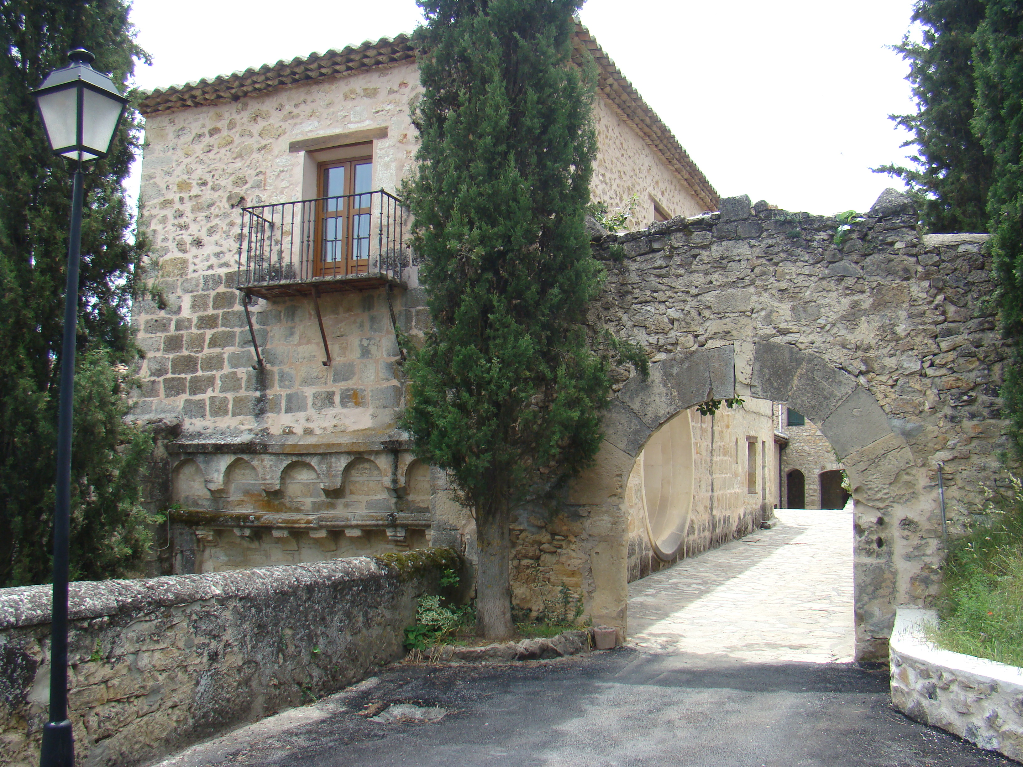 Buenafuente del Sistal, entrada al recinto del monasterio cisterciense femenino. Provincia de Guadalajara.